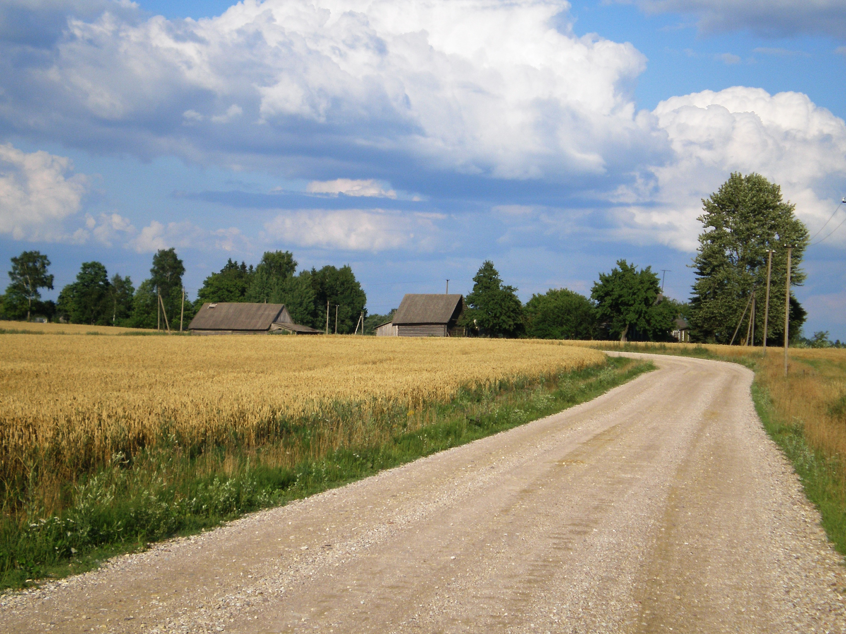 Lažai, Kėdainių raj.